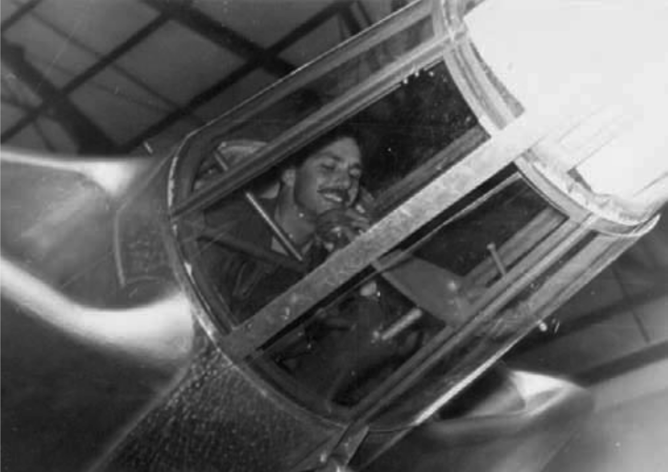 Conan Doyle en la cabina acristalada del FMA I.A. 37 planeador. Se aprecia el apoyo acolchado para el mentón, de la cabina "prone".